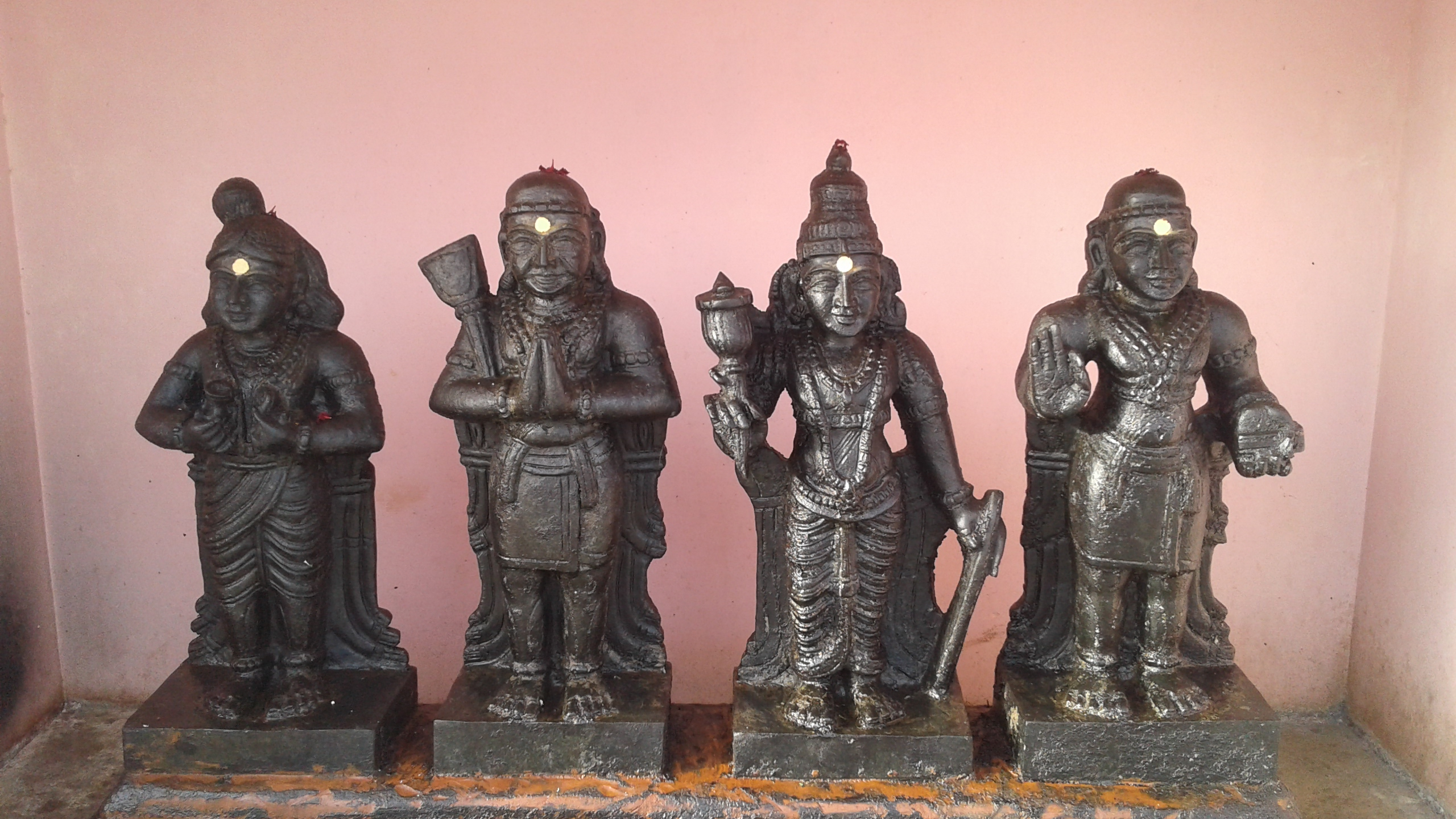 நால்வர் சிலைகள், நந்தமேடு வீரபாண்டீசுவரர் கோயில்